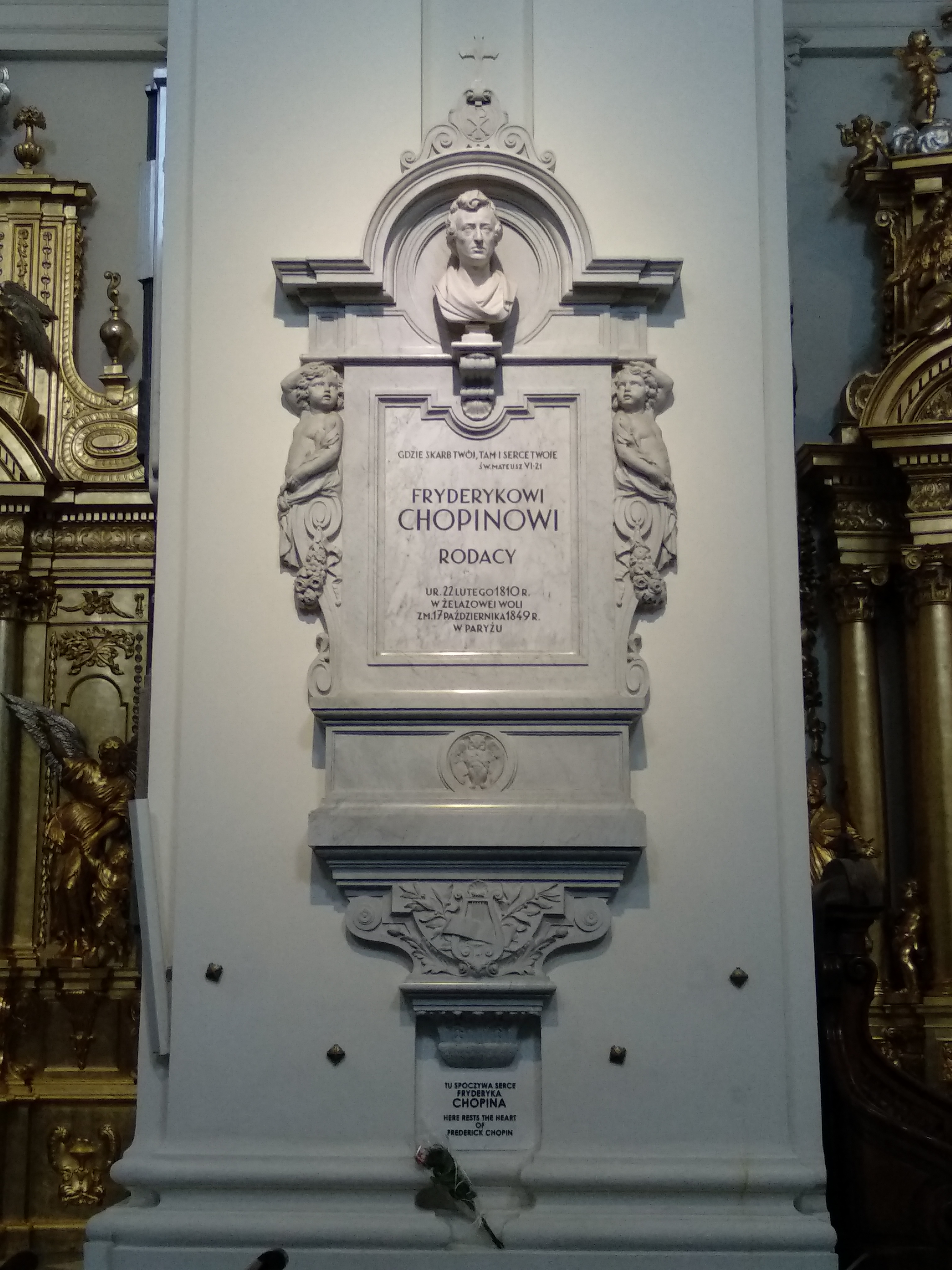 Sarkofag z sercem Fryderyka Chopina w Bazylice Świętego Krzyża w Warszawie.